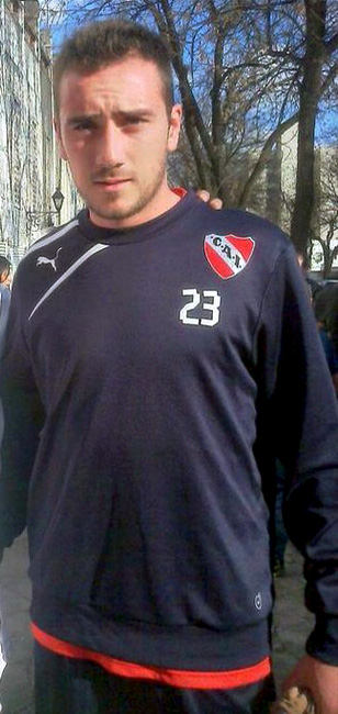 Federico Mancuello, después de un entrenamiento con su club, Independiente.